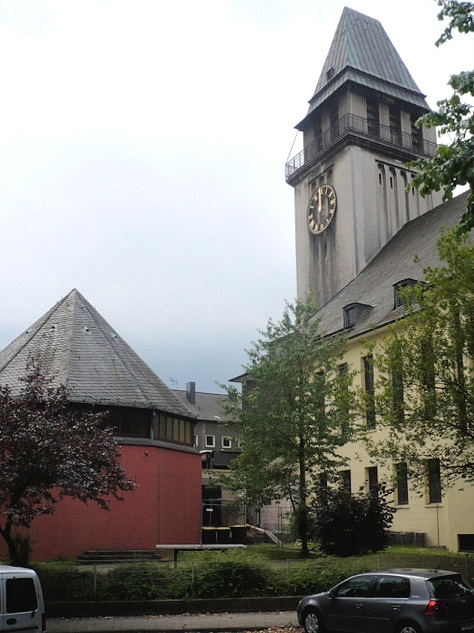 Apostelkirche mit Notkirche in Essen-Frohnhausen